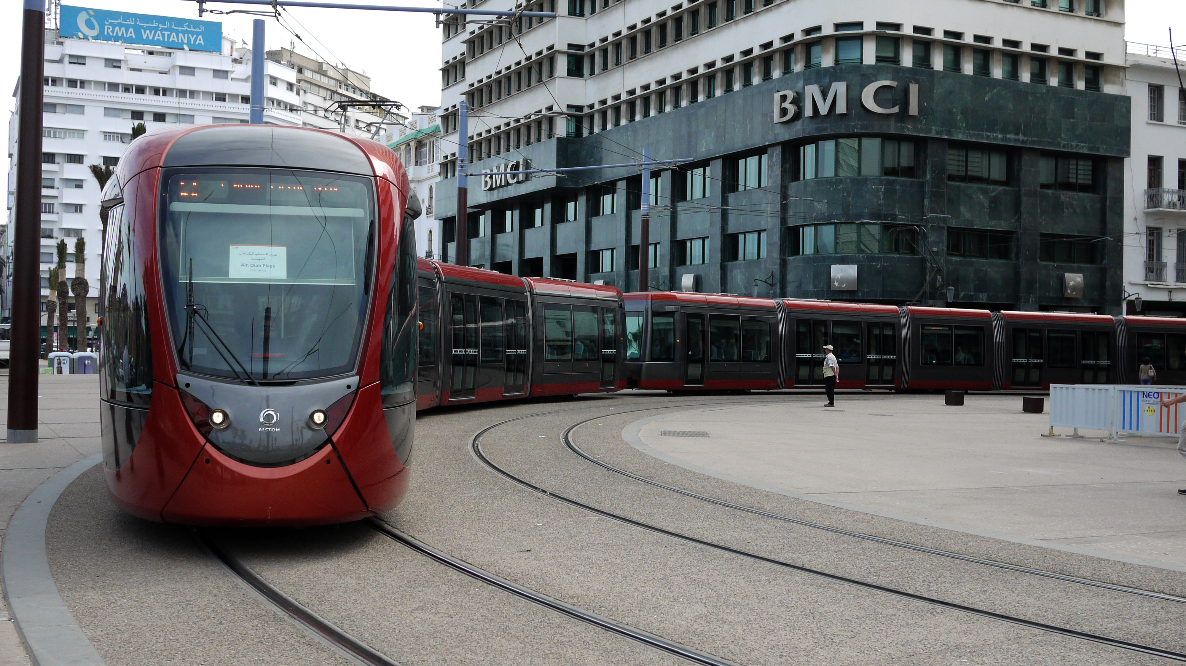 Tramway, Casablanca, Maroc